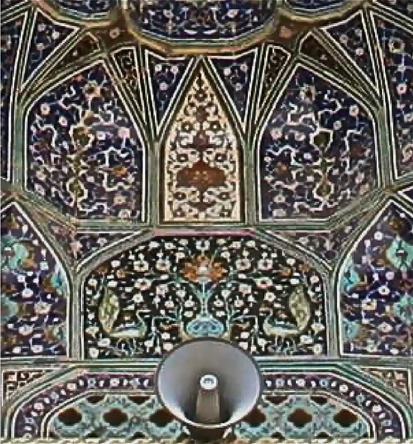 Mosquée Royale (Mosquée de l'Imam), entrée détail sur les paons